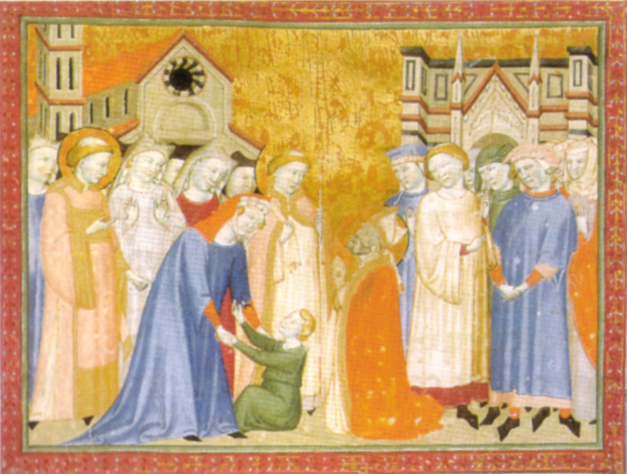 Miracolo di san zanobi, 1335 ca